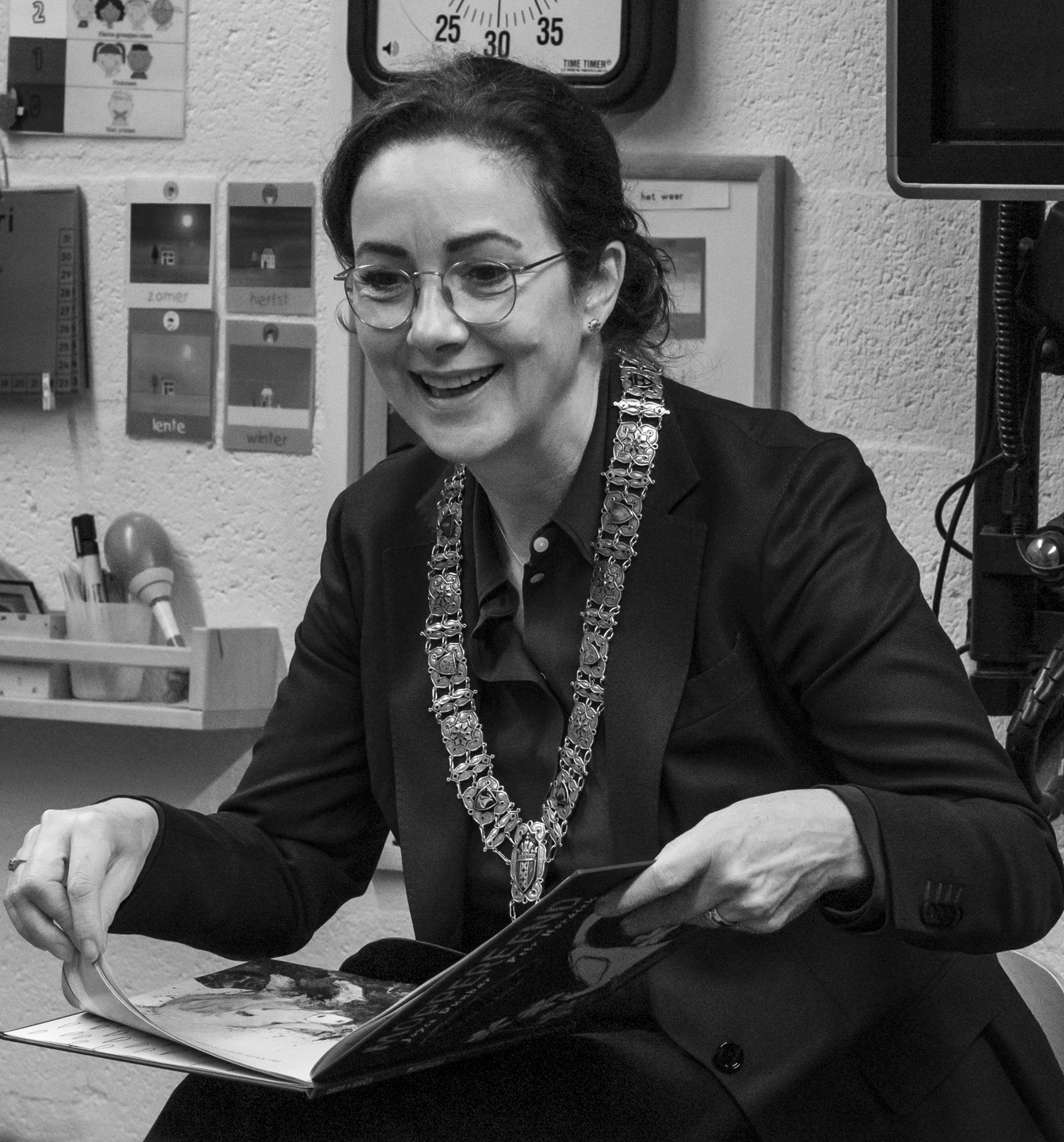 Burgemeester Femke Halsema leest uit het boek "Moppereend" voor aan een groep kinderen op een Amsterdamse basisschool in het kader van de nationale voorleesweken 2020